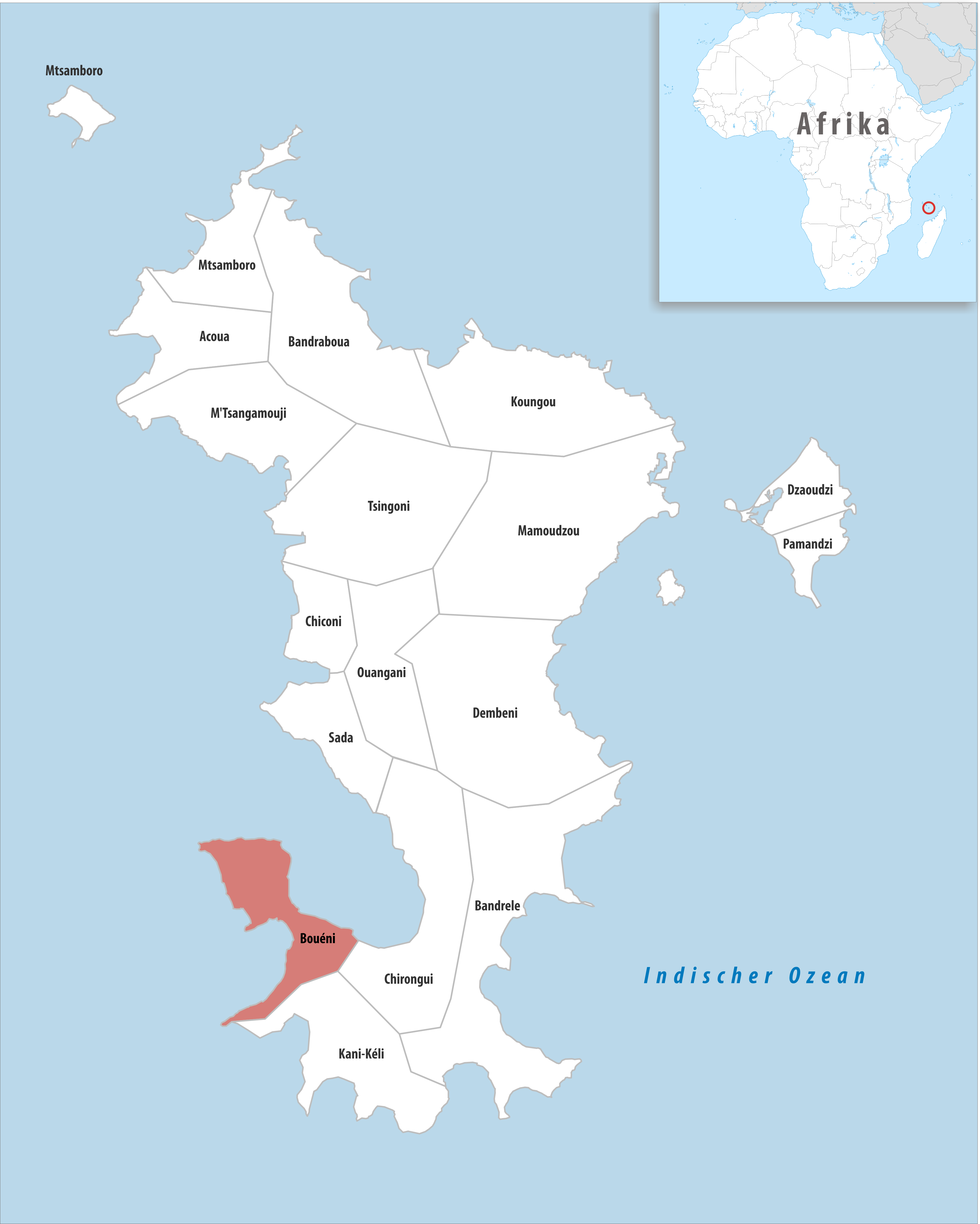 Lage der Gemeinde Bouéni